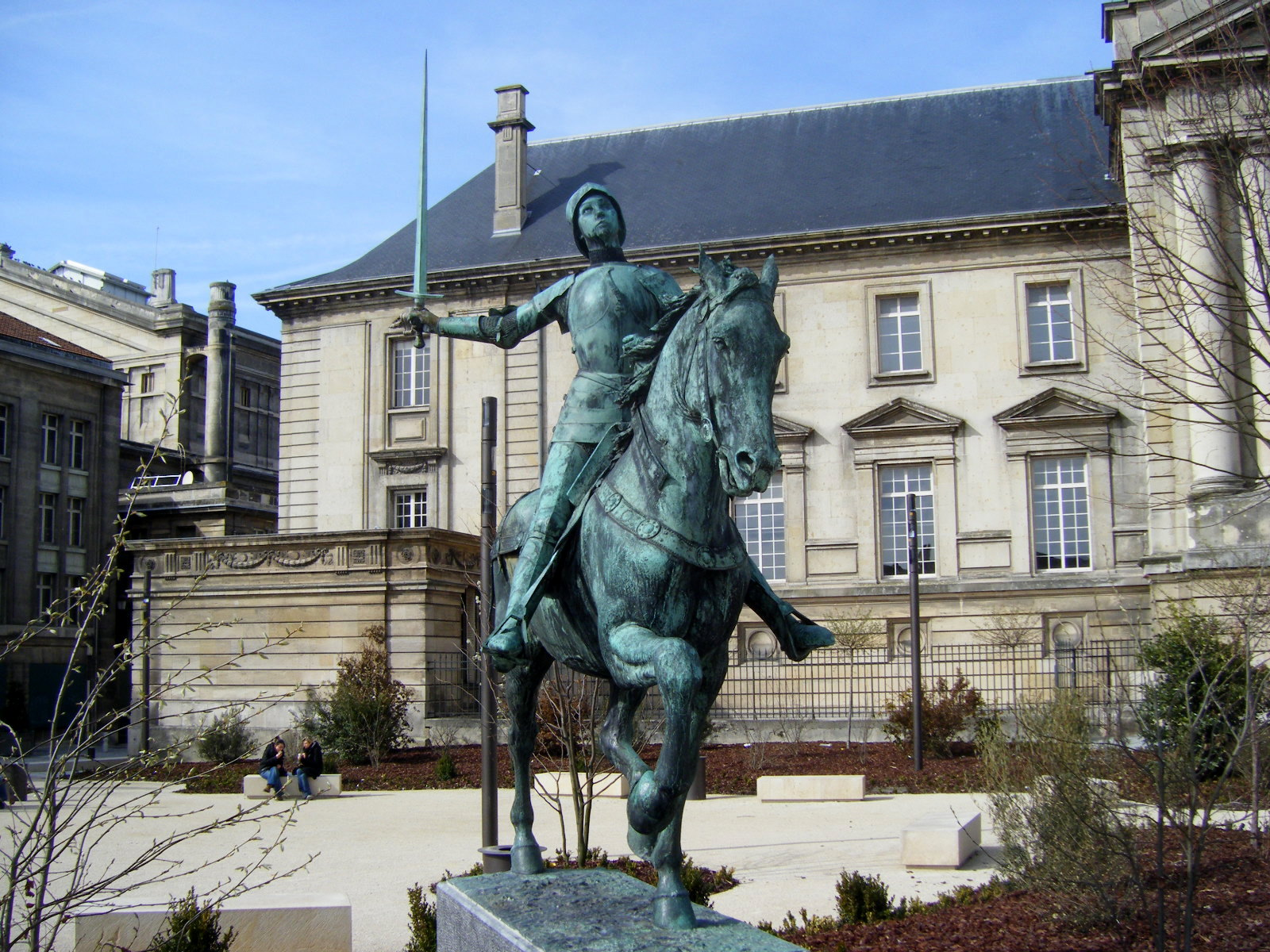 Jeanne d'Arc.